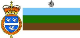 Герб и флаг Королевства Редонда